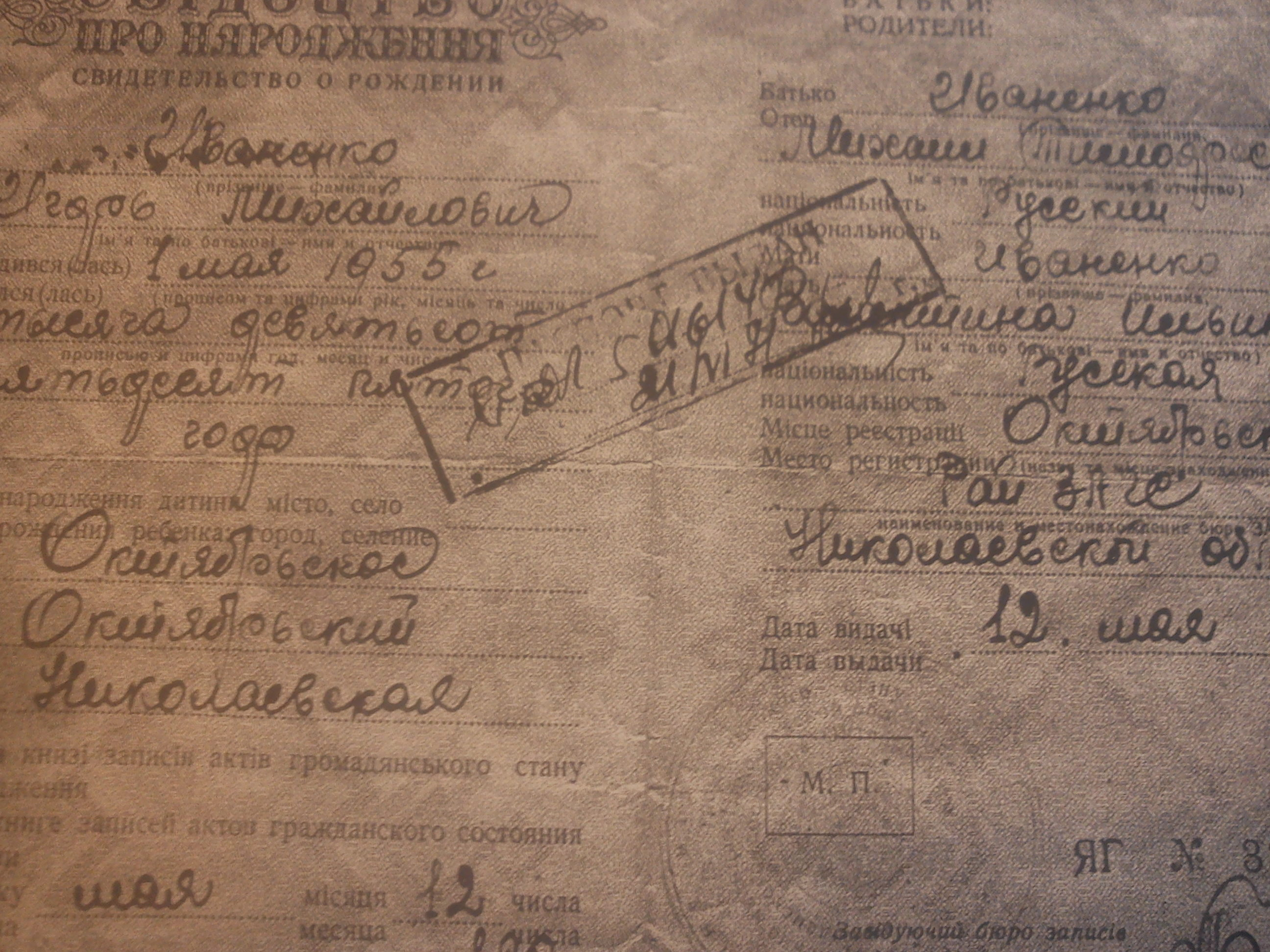 Свидетельство о рождении 1955 года на украинско-русской билингве с указанием родителей русской национальности